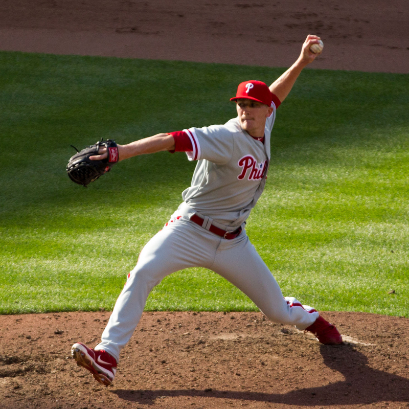 Jake Diekman